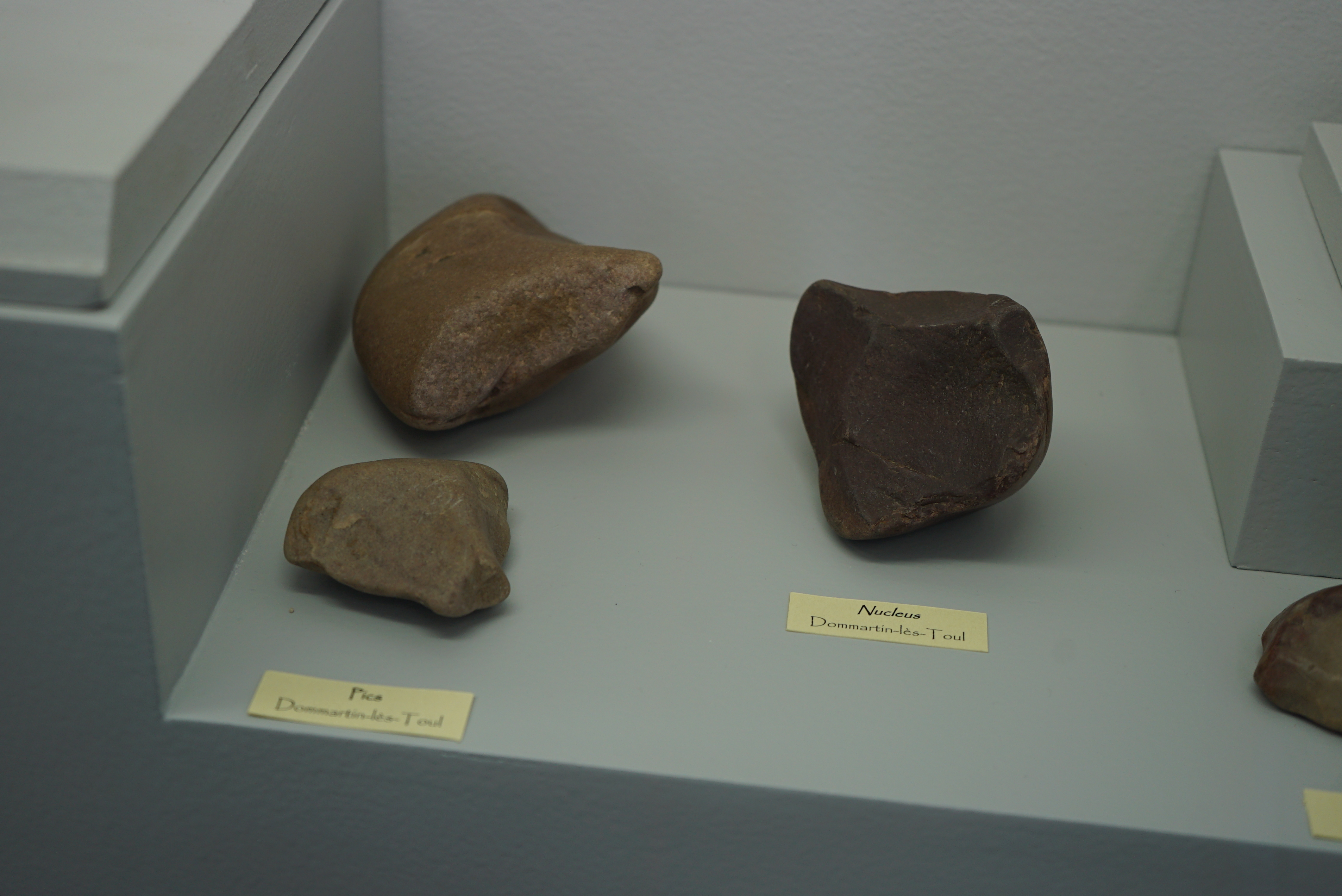 objets du paléolithique au musée de Toul.